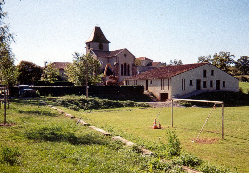 Saint-Félix